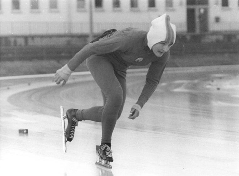 Birgit Männel ADN-ZB Mittelstädt 22.12.73 Berlin: DDR-Mehrkampfmeisterschaften im Eisschnellauf auf der 400-m-Kunsteisbahn im Berliner Sportforum Neue Titelträgerin bei den Frauen wurde die 18jährige Schülerin aus Karl-Marx-Stadt, Birgit Männel (Foto von einem früheren Wettkampf), durch eine ausgezeichnete Leistung im abschließenden 3000-m-Lauf (5:11´1 min).